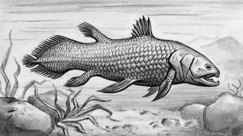 Латимерія